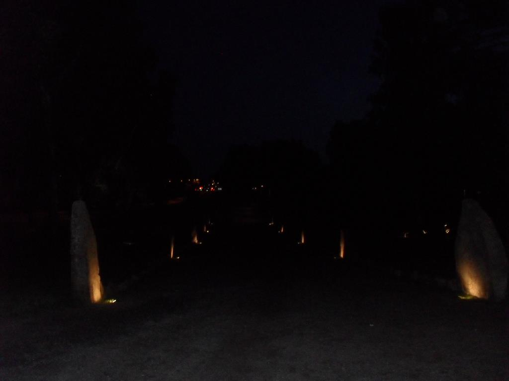 Jarlabankes bro på kvällen